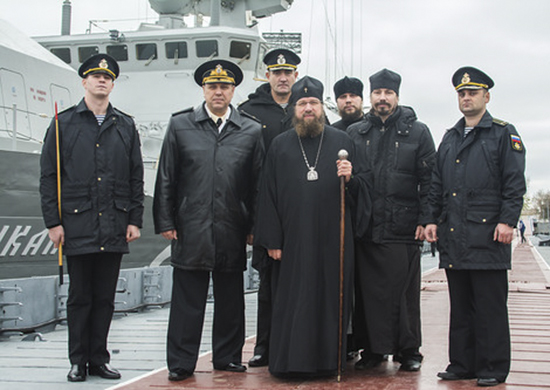 Гвардейскую бригаду кораблей Каспийской флотилии посетил митрополит Астраханский и Камызякский Никон